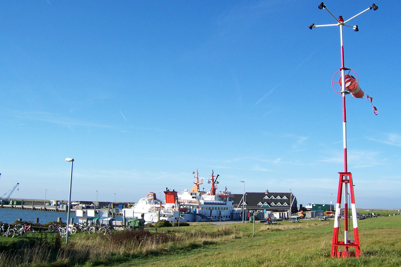 Nordseeinsel Spiekeroog. Blick auf Hafen vom Hubschrauberlandeplatz